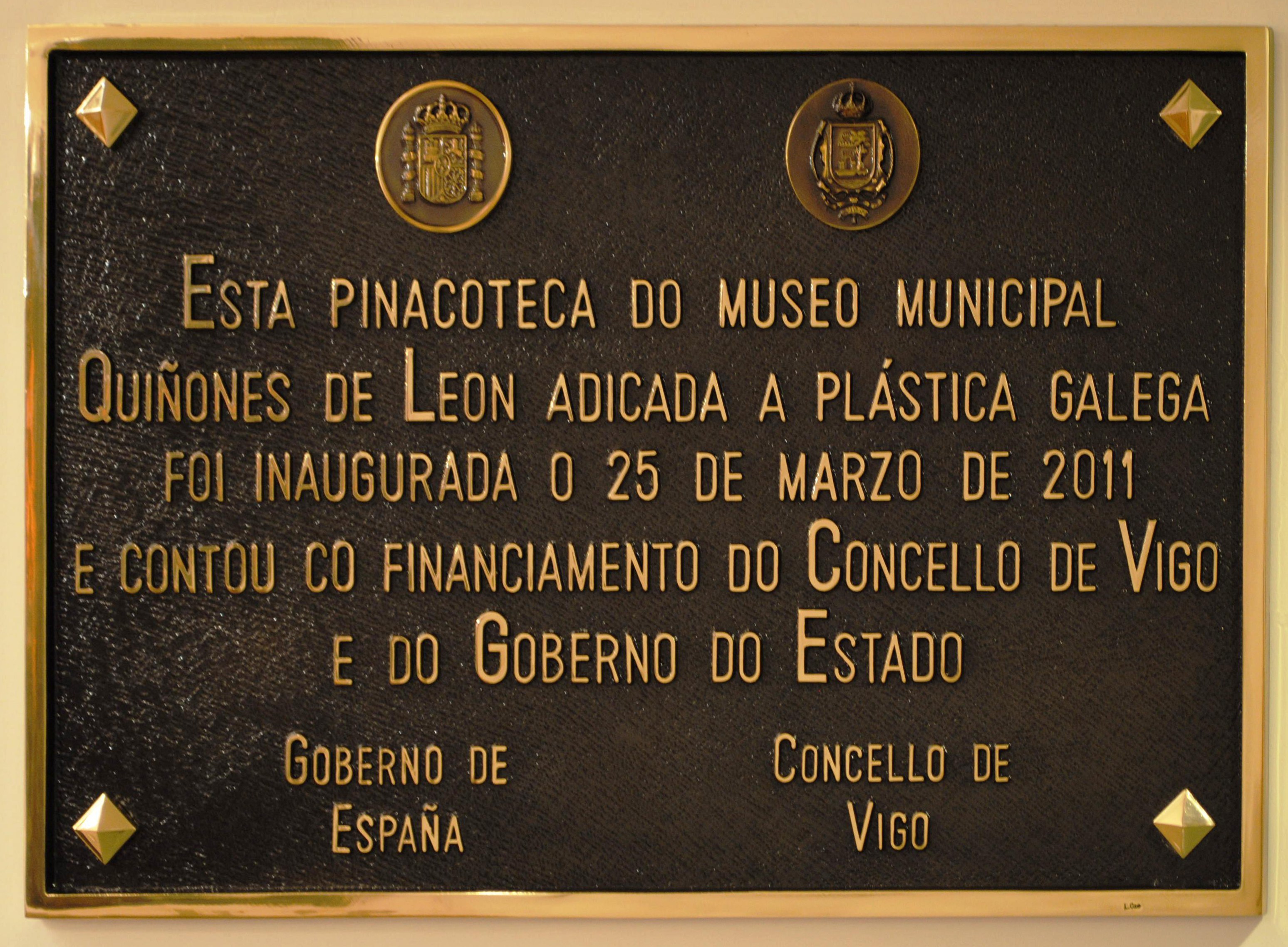 Vexa o título e as categorías.